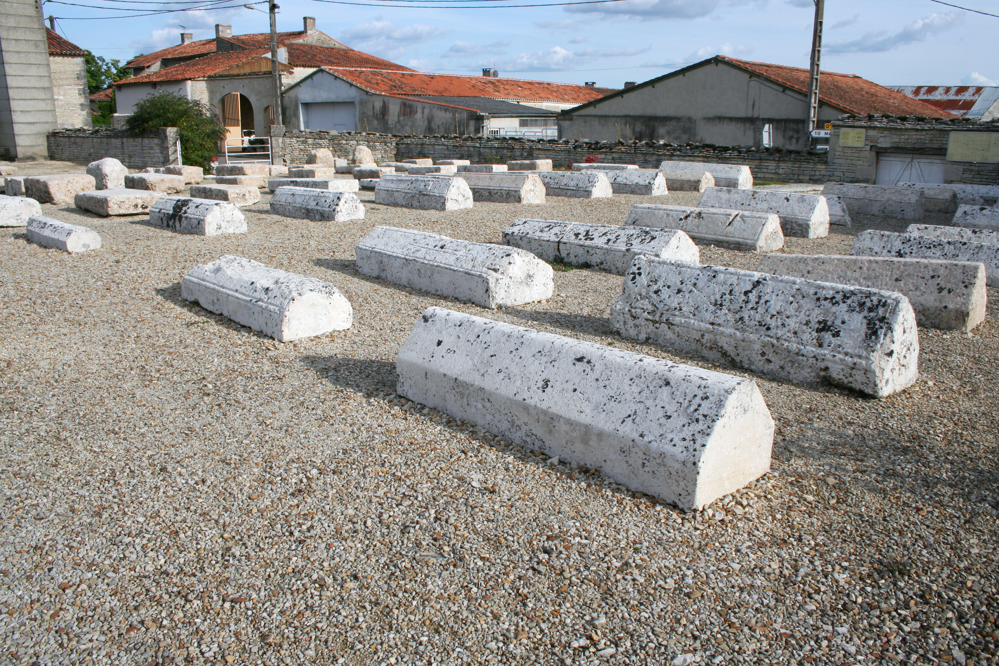 Le cimetière de Ligné en Charente.